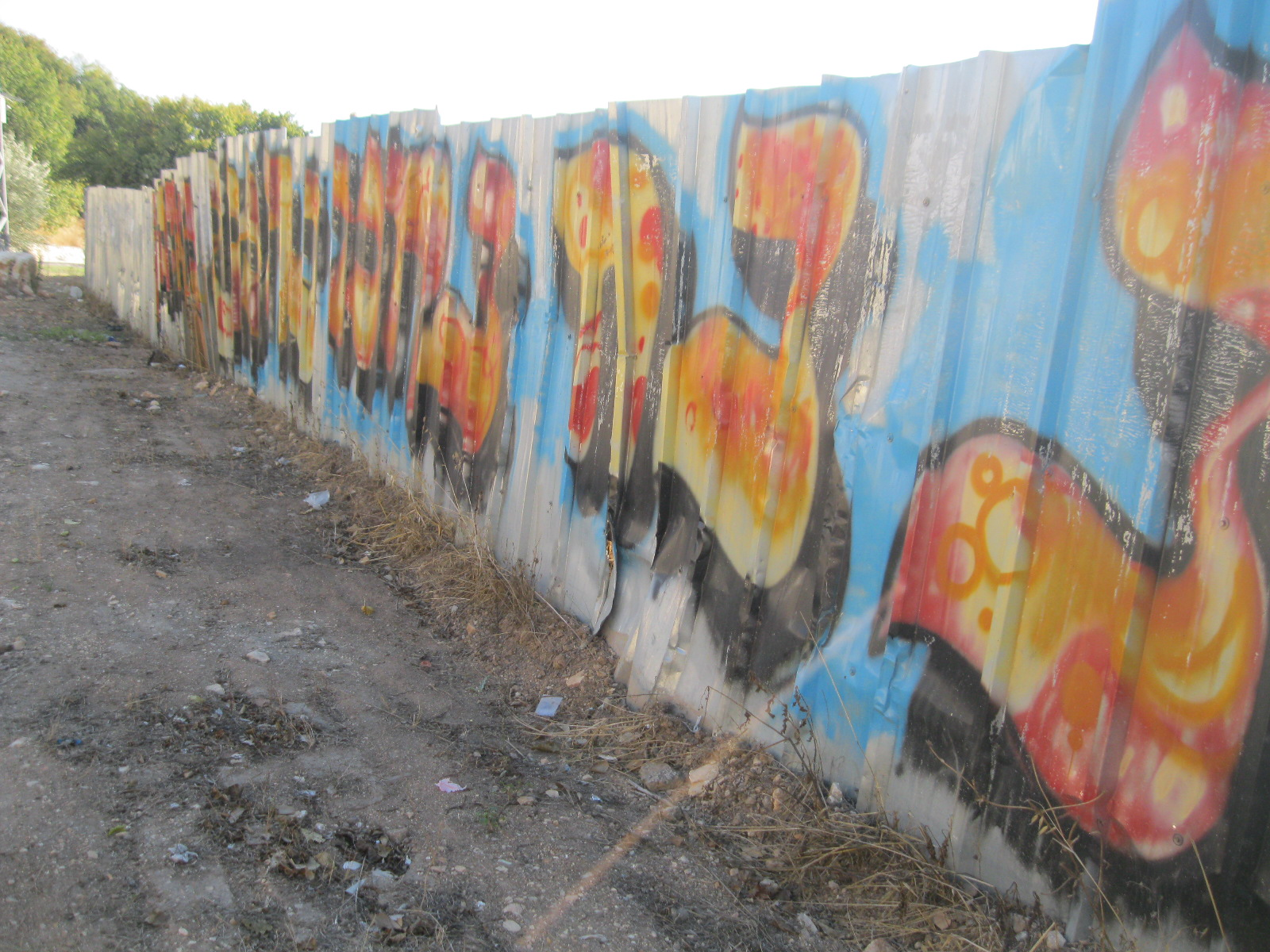 גרפיטי נחמן מאומן